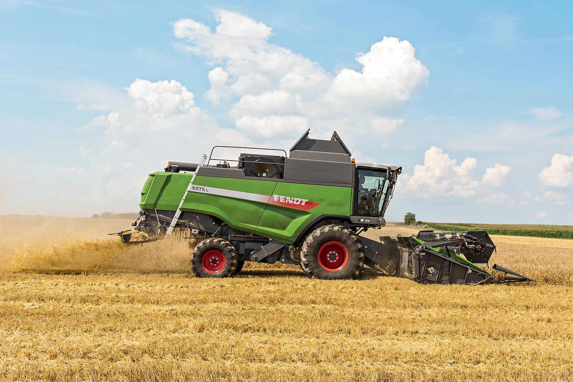 Fendt L-Serie